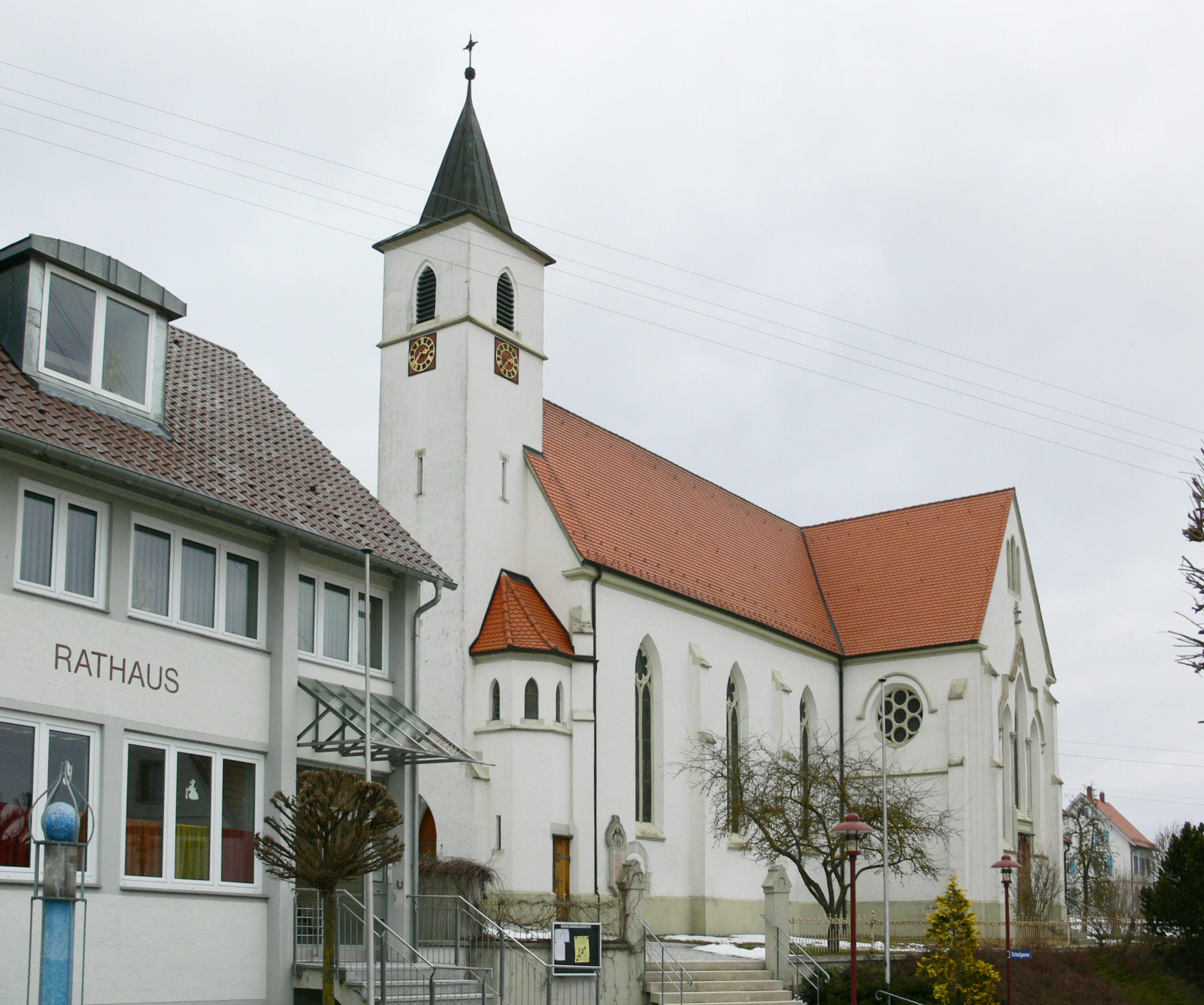 Boms, Rathaus und Pfarrkirche Unserer Lieben Frau von La Salette